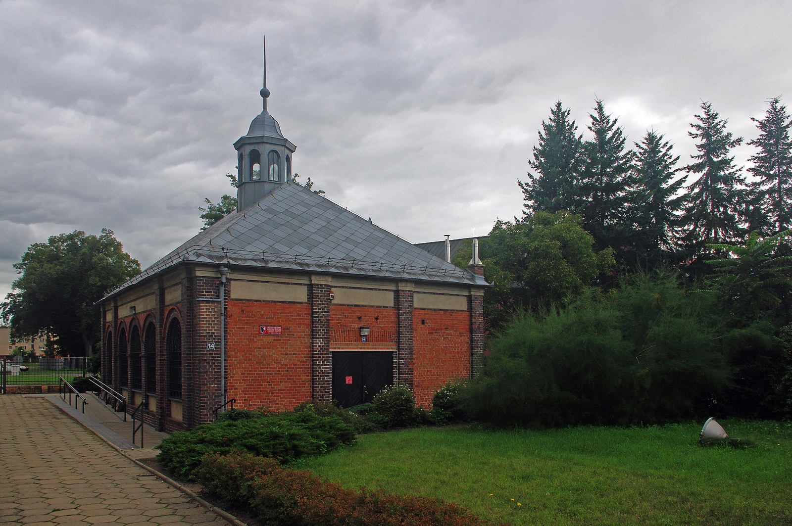 Leszno, al. Jana Pawła II 12-14 - zespół dawnego cmentarza żydowskiego: relikty cmentarza z XVII - XX w., dom przedpogrzebowy nr 14 z początku XX w., dawny dom grabarza nr 12 z 1. ćw. XX w. (zabytek nr 787/Wlkp/A)